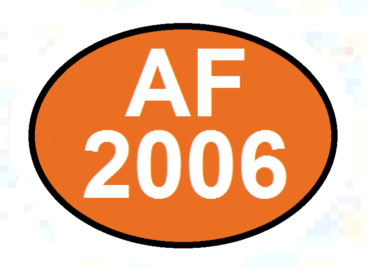 Alianza por el Futuro 2006.